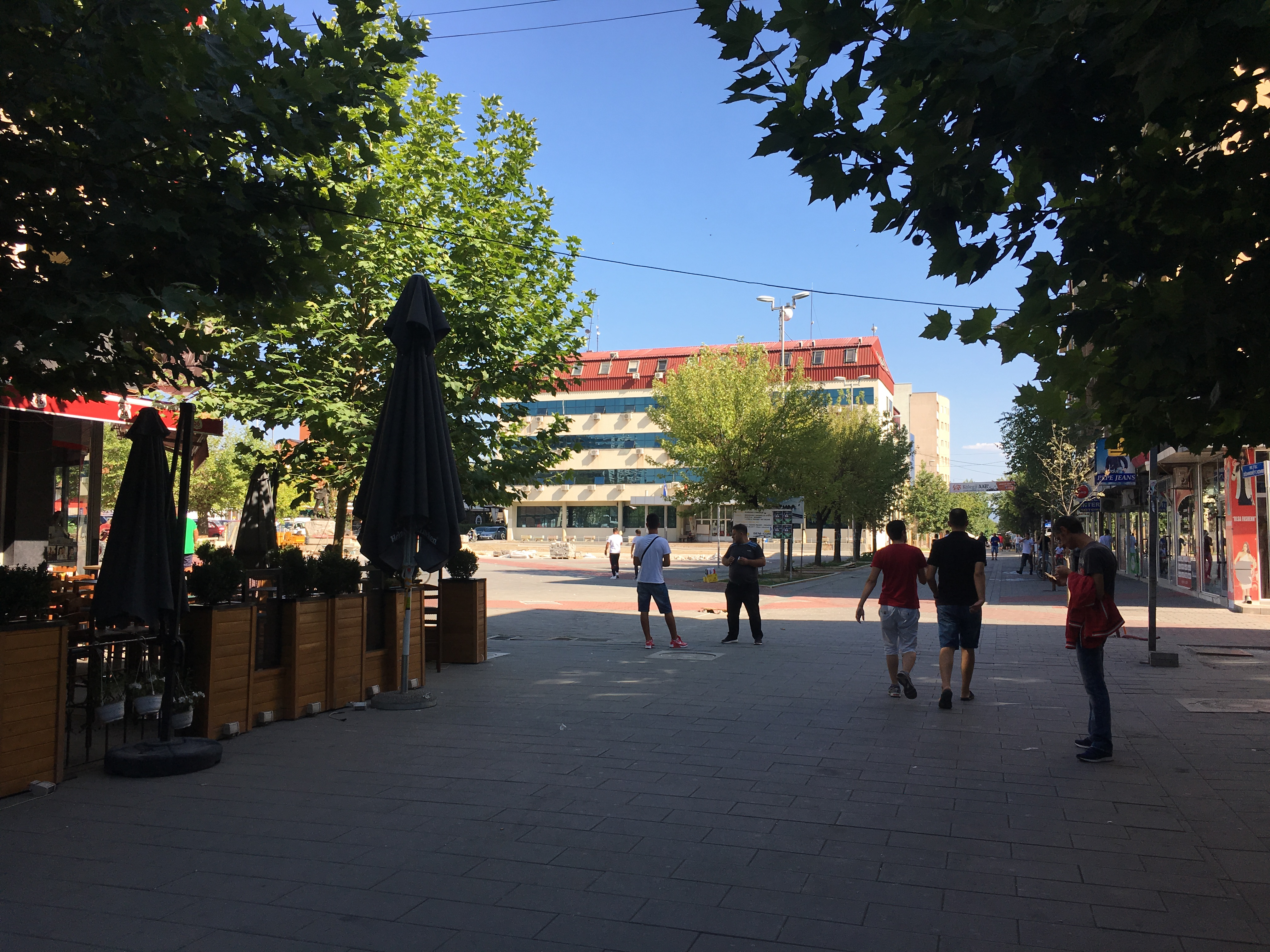 Rathaus Ferizaj 27.08.2017